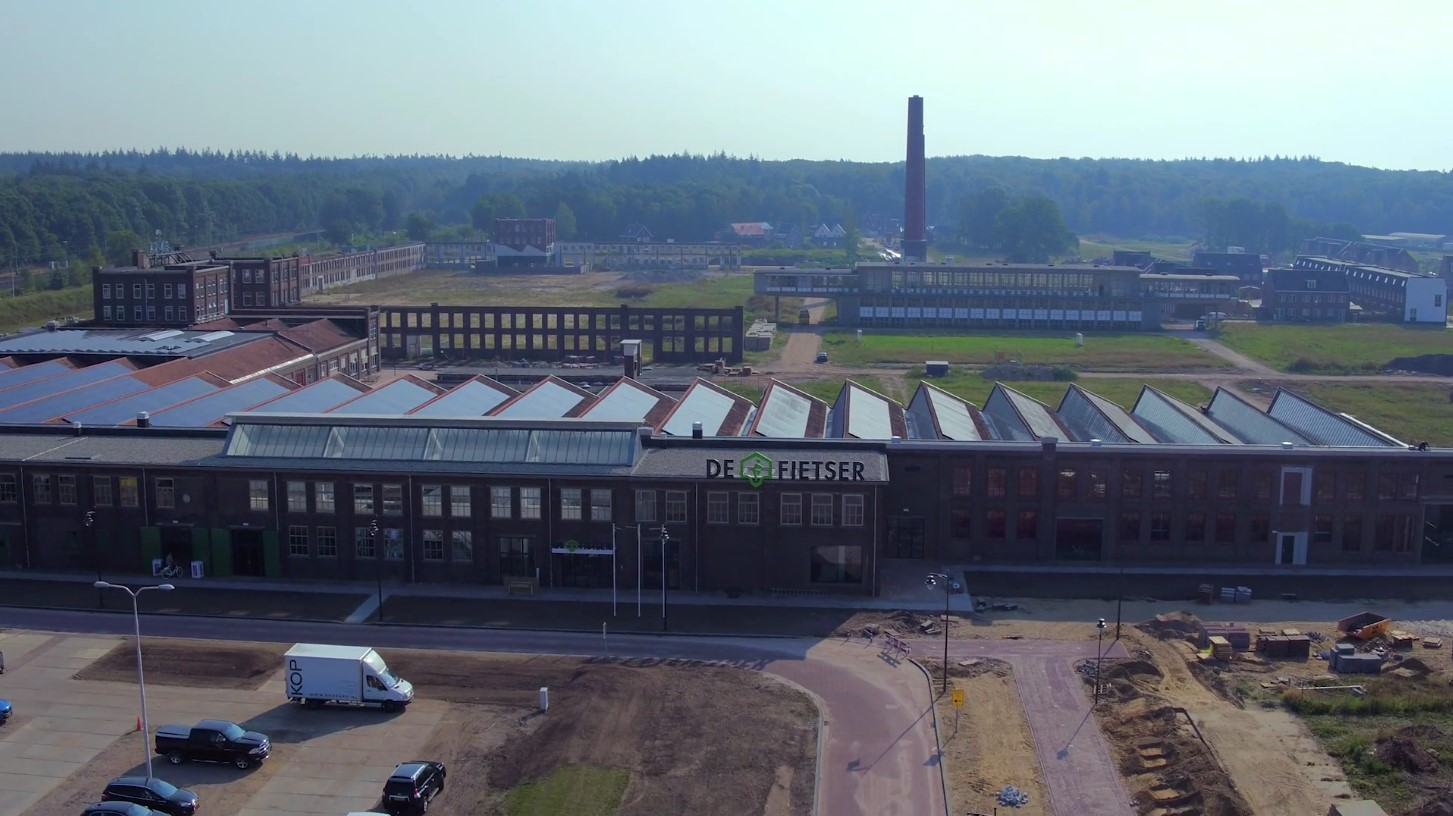 Luchtfoto Westhal Enka Fabriek na restauratie en transformatie naar fiets Experience Centre